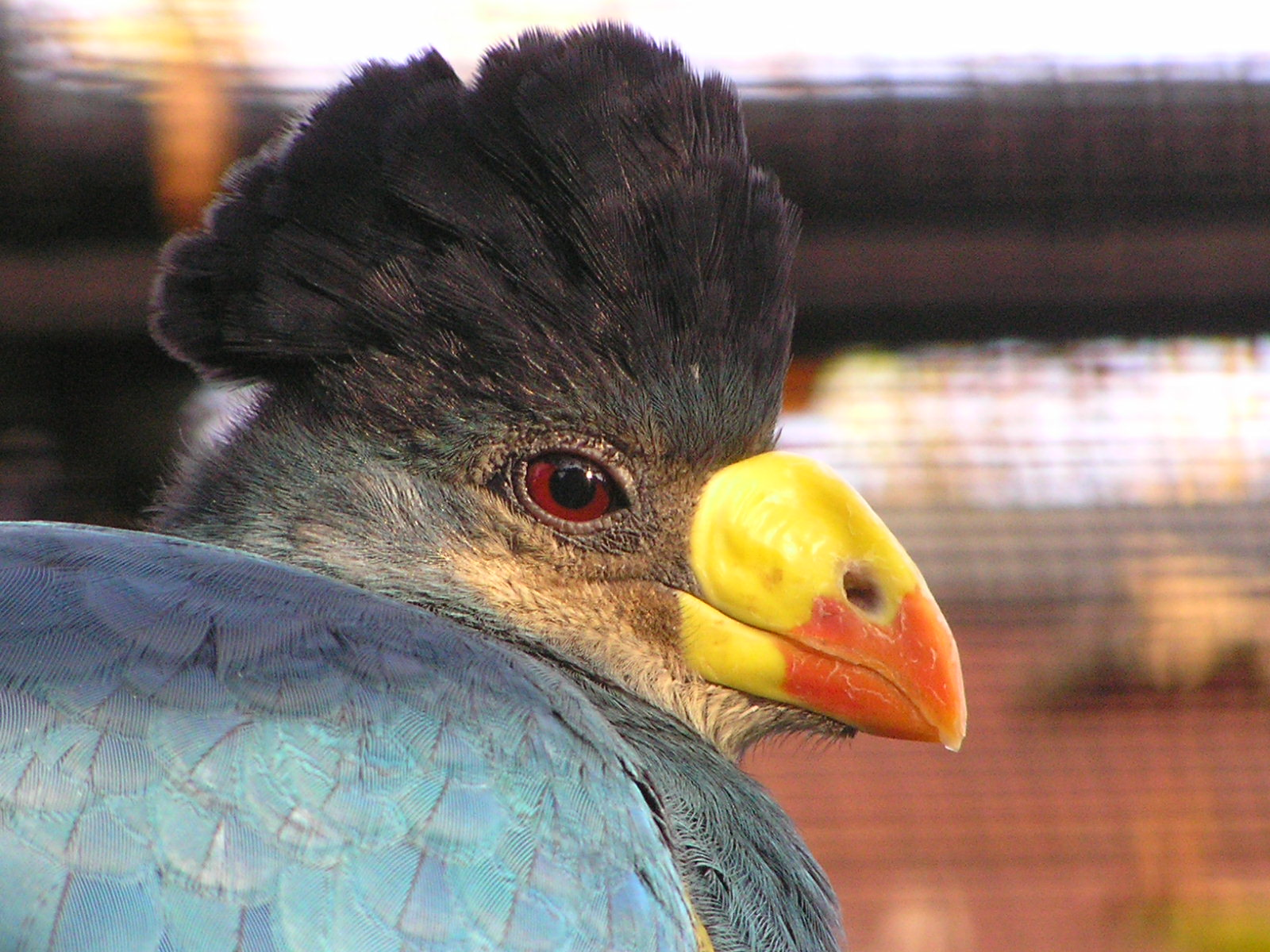 Great Blue Turaco